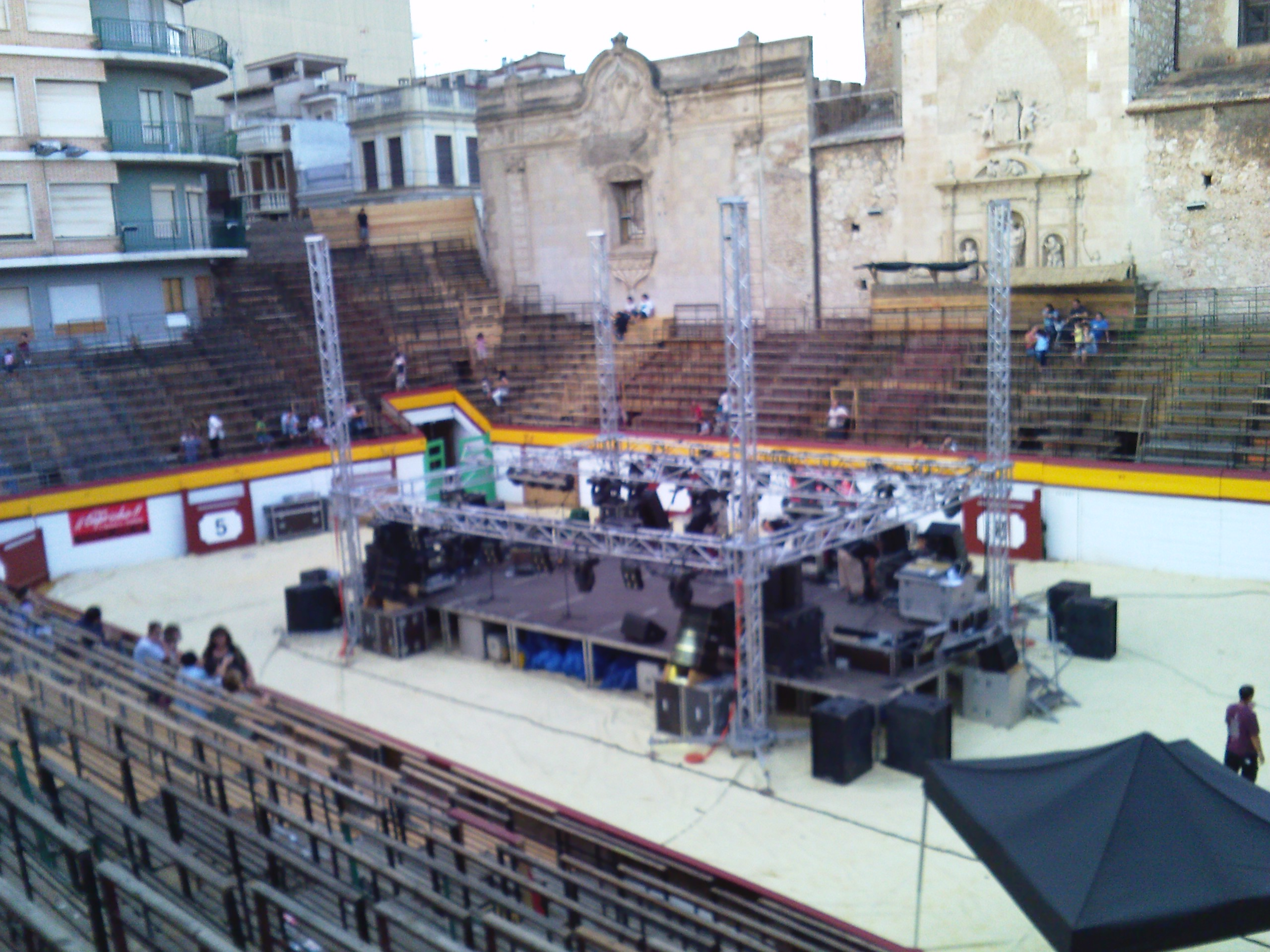 Plaza de Toros de Algemesí preparada para celebrar el concierto de el Sueño de Morfeo, el viernes 17 de septiembre de 2010, el cual se suspendió por la lluvia.